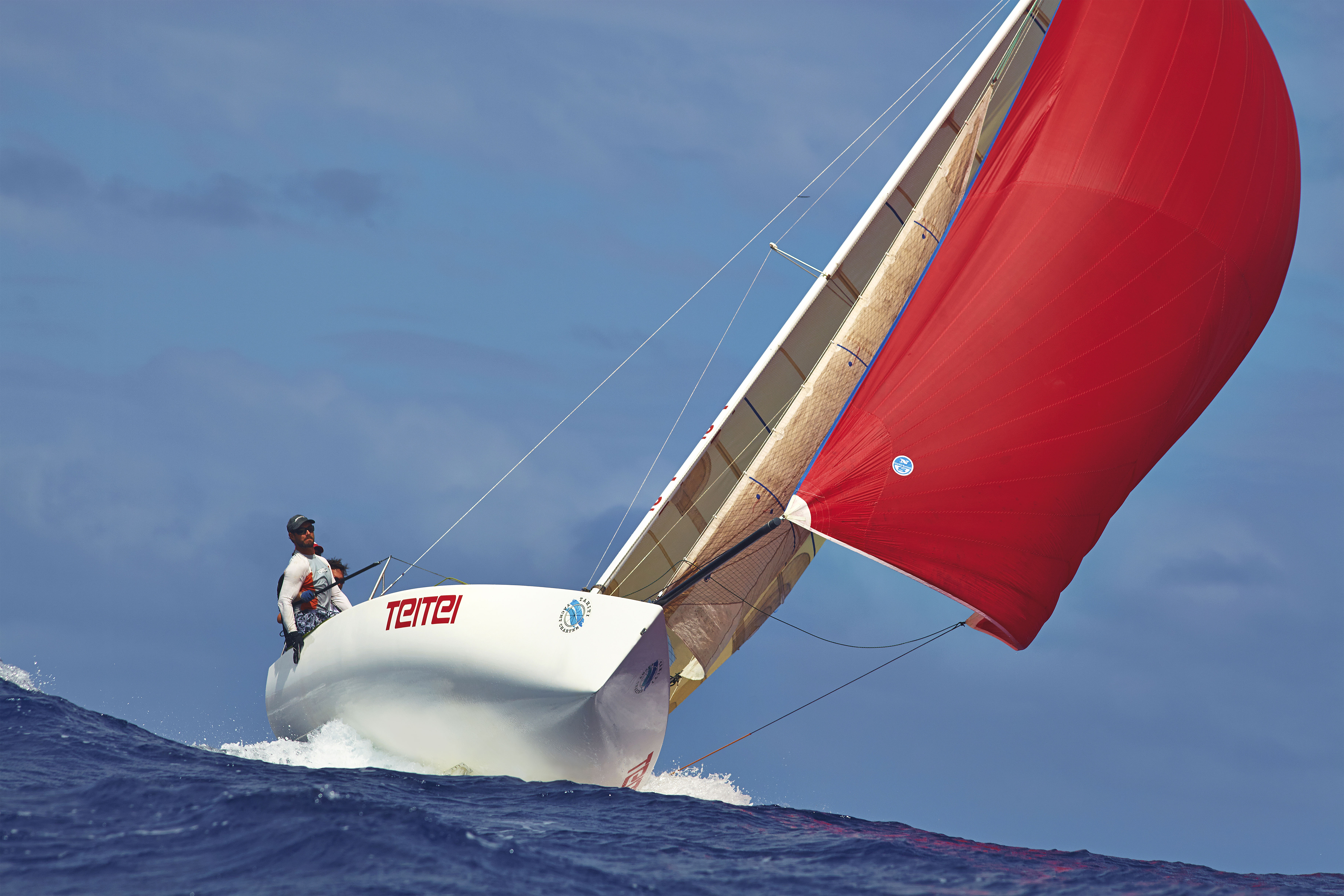 Sf18 quillard sous spi lourd. Bora Bora 2014